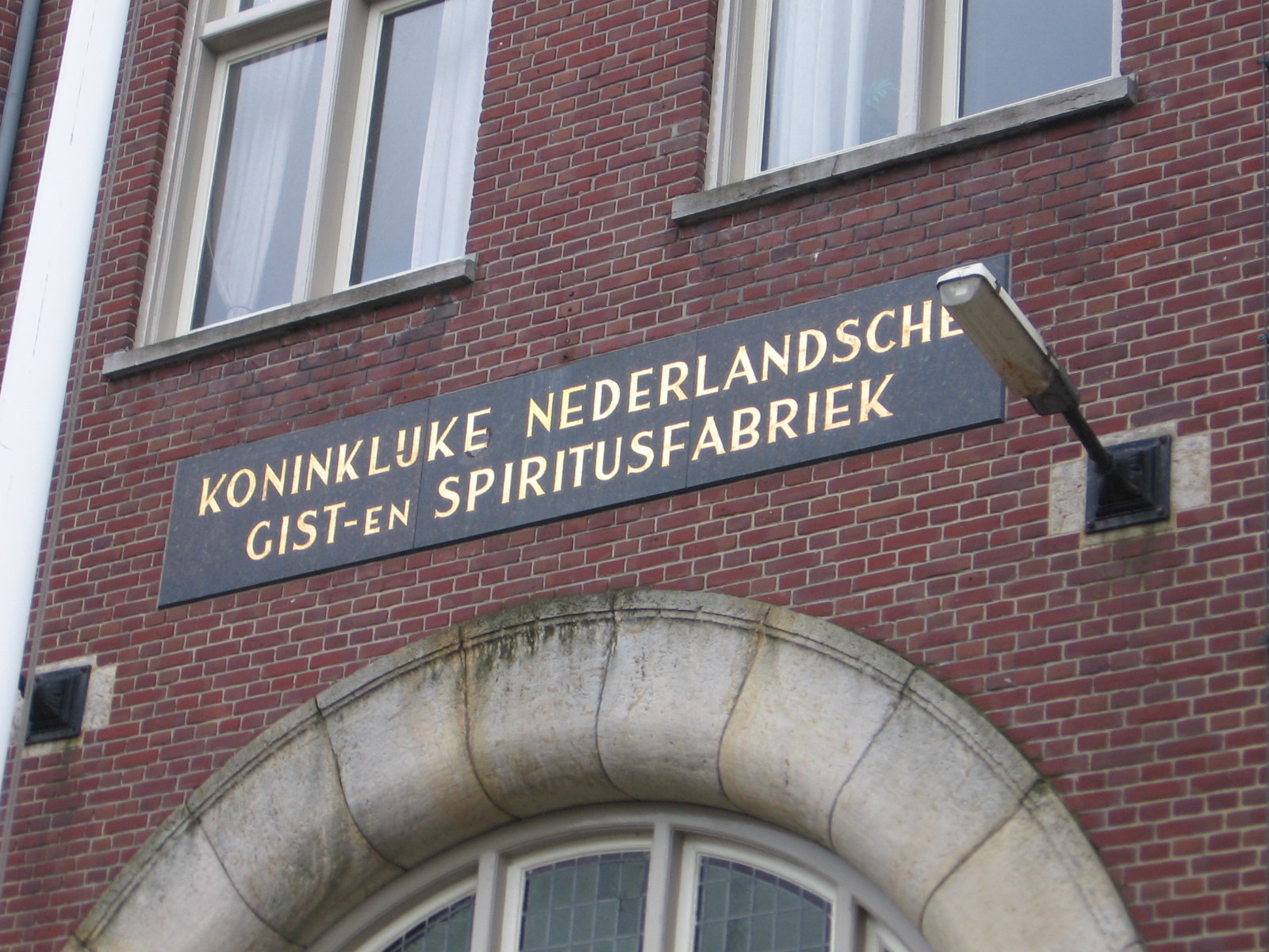 Koninklijke Nederlandsche Gist en spiritusfabriek, Delft. In oorsprong hoofdgebouw Kon. Ned. Gist- en Spiritusfabriek. Architecten B. Schelling en K. Muller (1905)